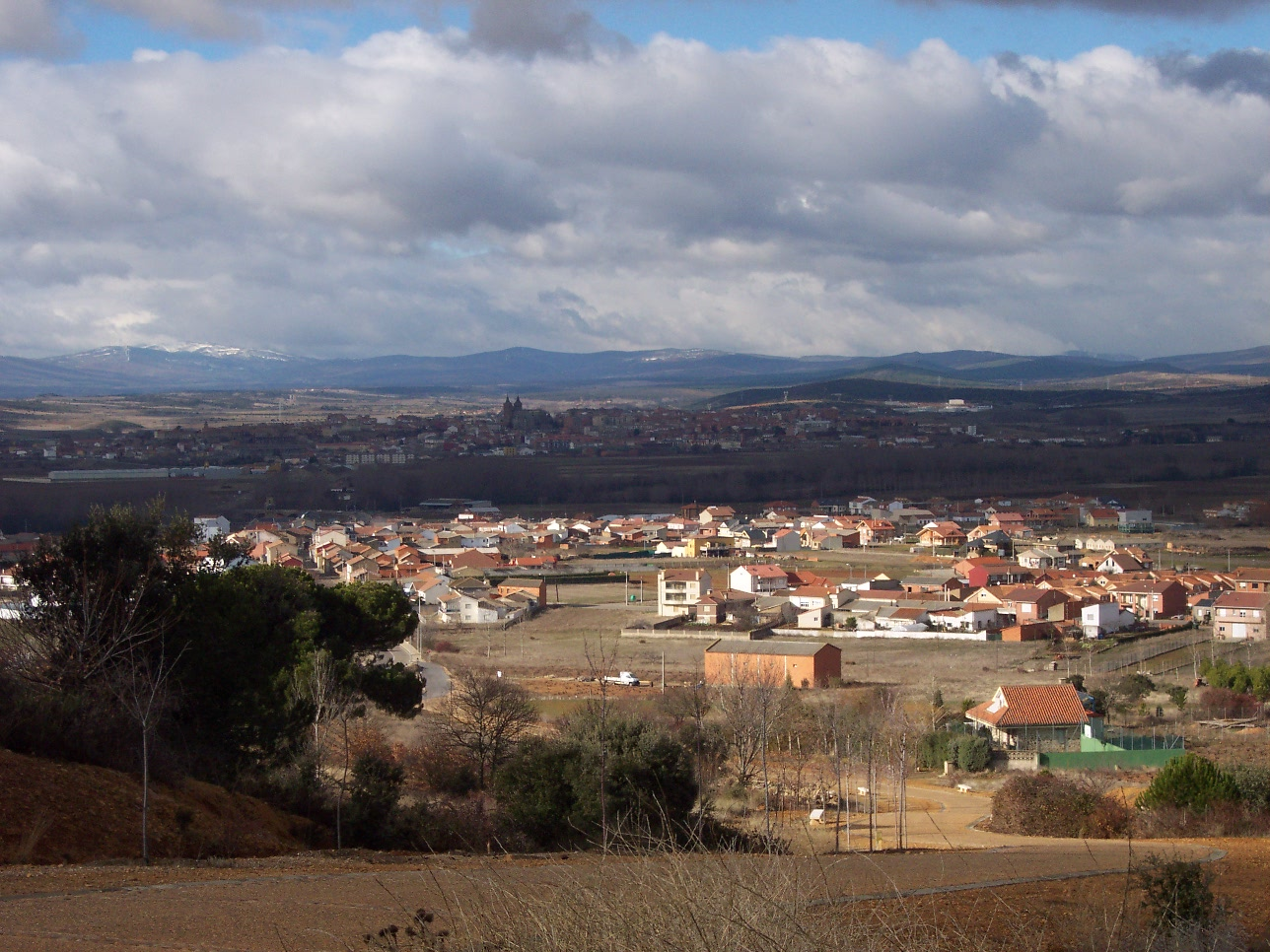 Vista de San Justo de la Vega.